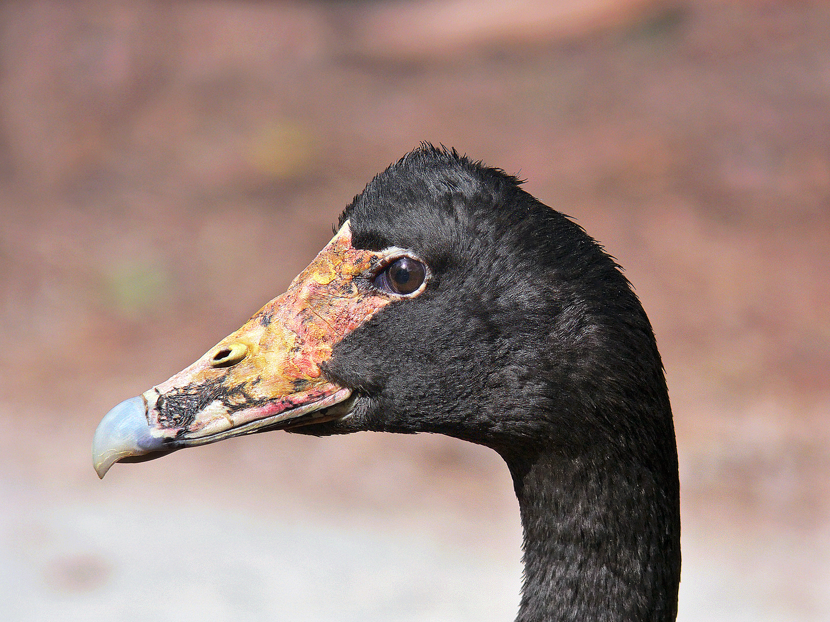 A Magpie Goose (Anseranas semipalmata) taken in Australia.